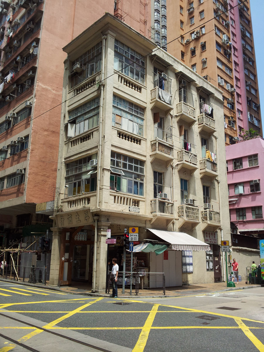 207 Des Voeux Road West, Sai Ying Pun